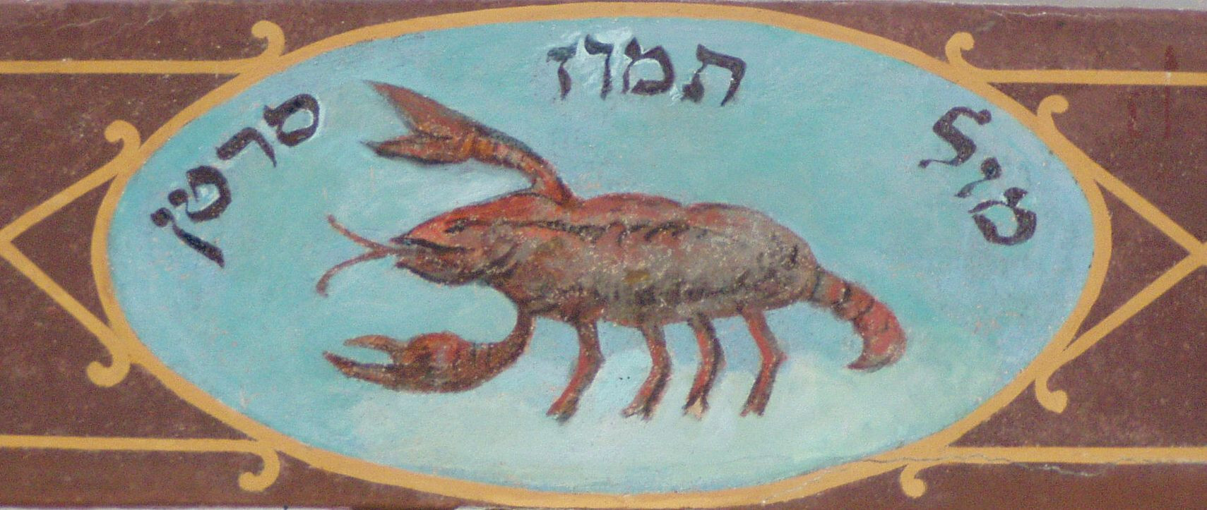 Znaki zodiaku na belkowaniu galerii dla kobiet synagogi Kupa w Krakowie